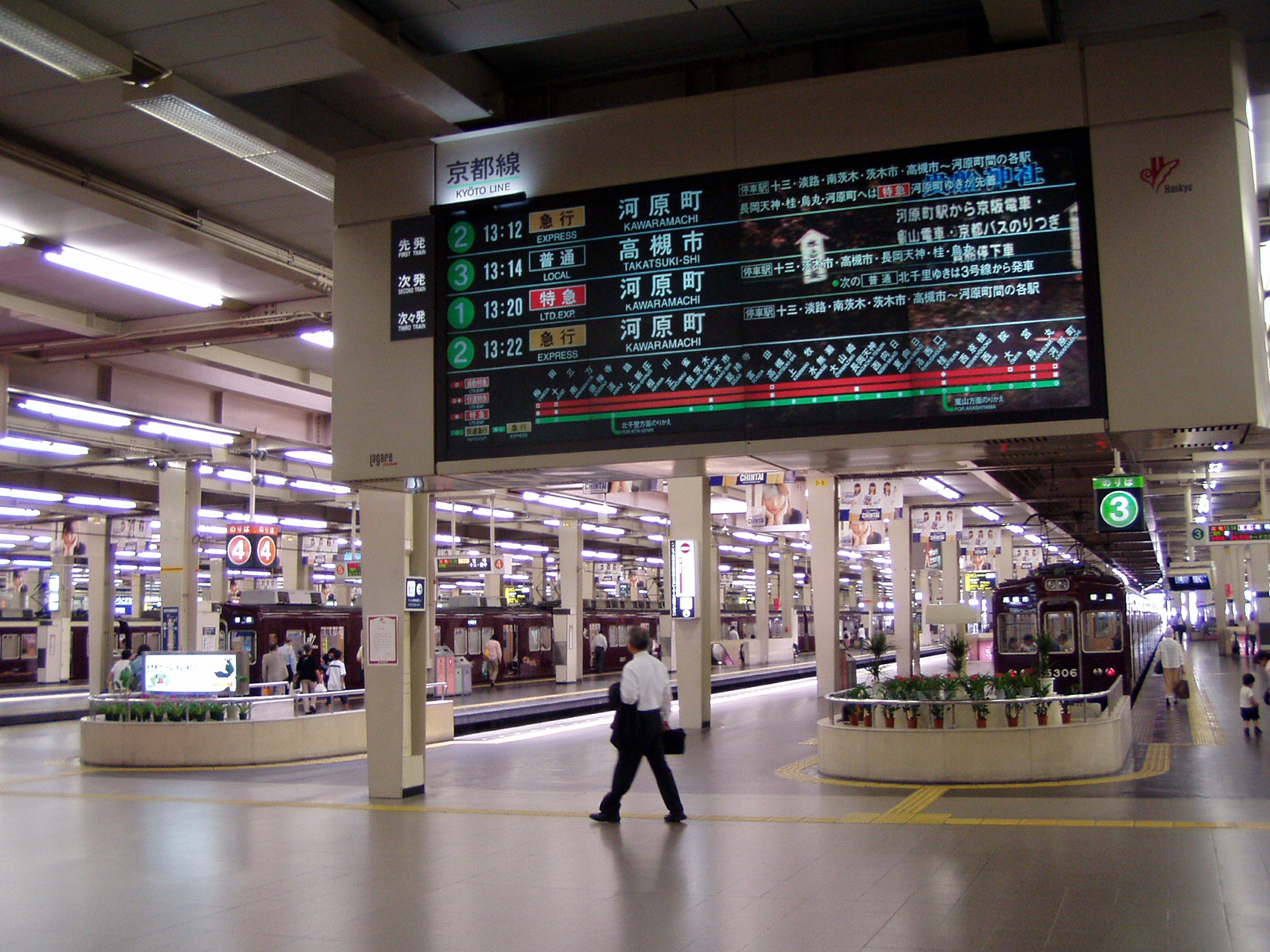 Osaka. Hankyu-Umeda Station, platforms.